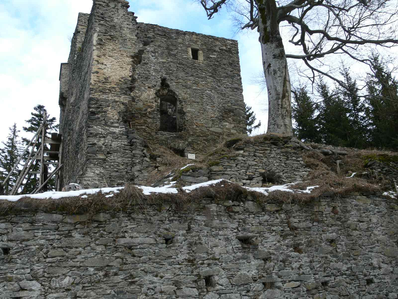 Burgruine Hauenstein/Hanstein